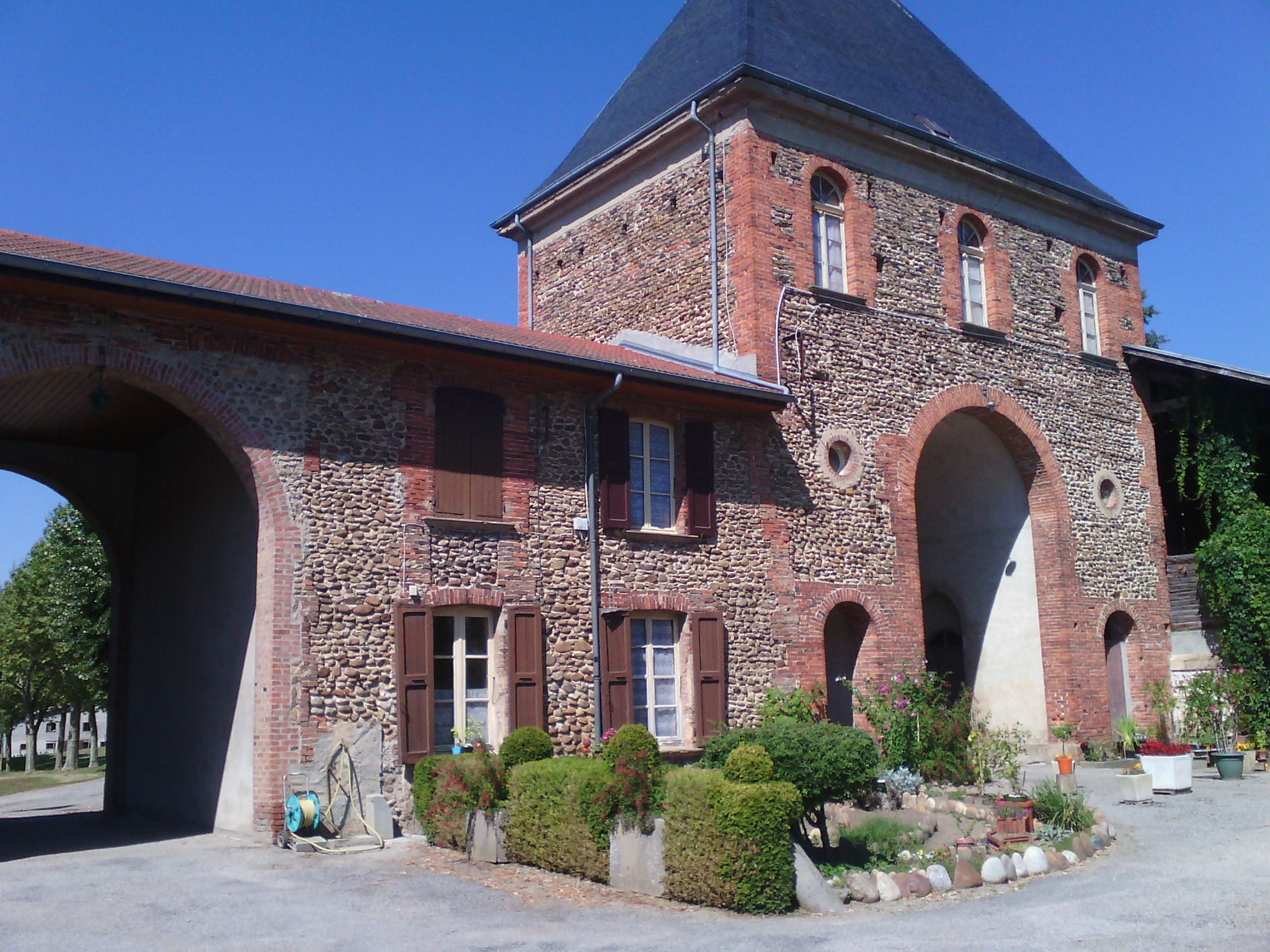 Portail de l'abbaye de Chambarand, vu de l'intérieur du cloître.